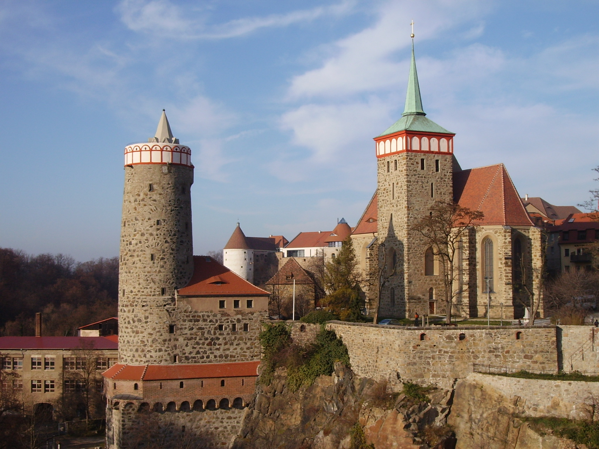 Bautzen, der bekannteste Teil des Altstadt-Panoramas, bestehend aus Alter Wasserkunst und Michaeliskirche. Hornjoserbsce: Budyšin – najznaćiši dźěl staroměšćanskeje panoramy ze Starej wodarnju a Michałskej cyrkwju.